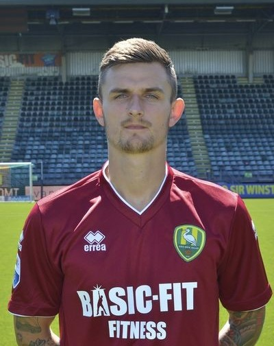 Martin Hansen